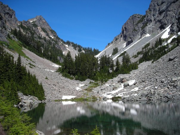 A view of Upper Melakwa Lake looking towards Melakwa Pass.